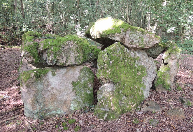 Dolmen du puits aux ladres avec 2 tables et 3 orthostats visibles et partiellement couverts de mousses dans un bois